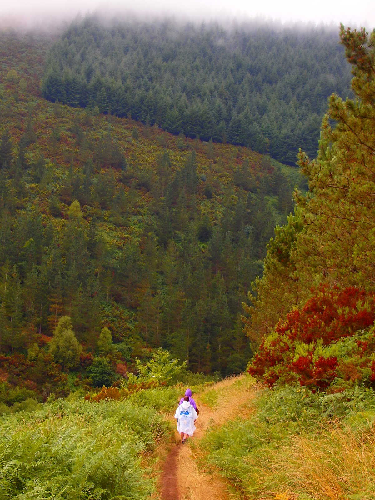 Camiño de Santiago pola Serra da Lastra.